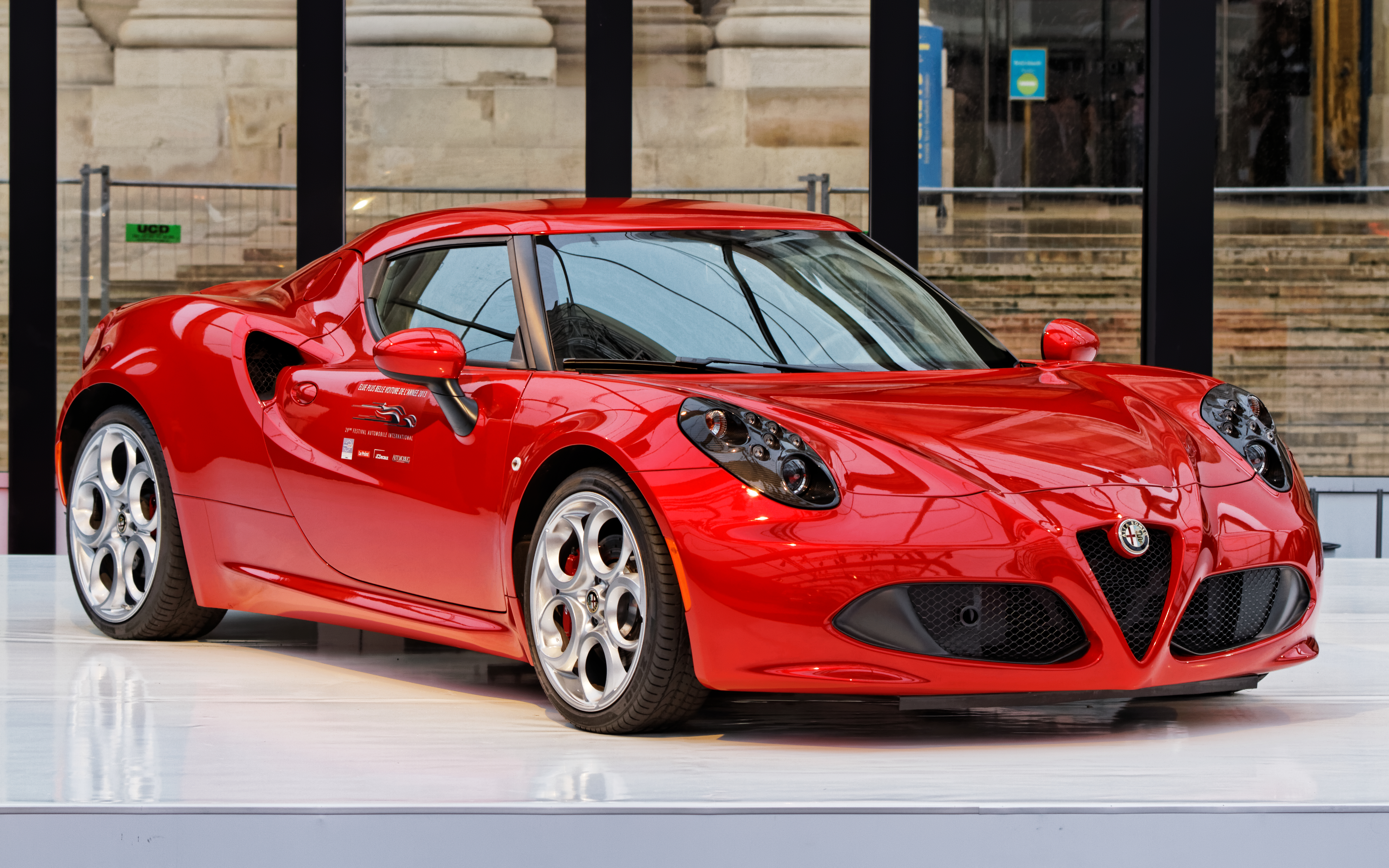 L'Alfa Romeo 4C exposée lors du festival automobile international 2014.